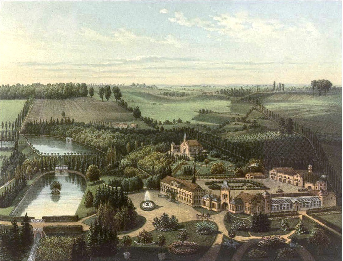 Schloss Taczanowo, Kreis Pleschen, Provinz Posen